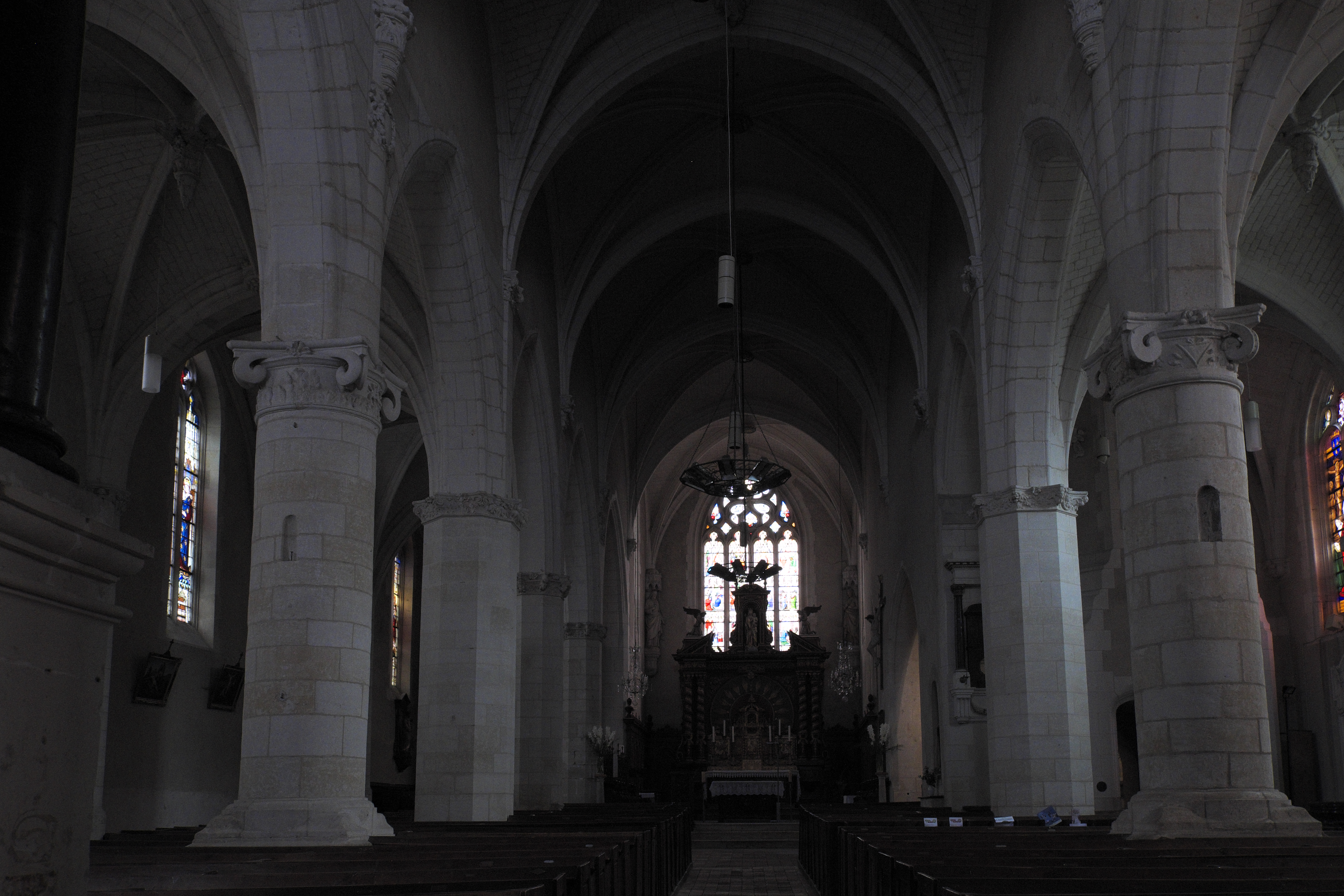 Kirche Notre-Dame in Saint-Calais im Département Sarthe (Pays de la Loire/Frankreich), Innenraum